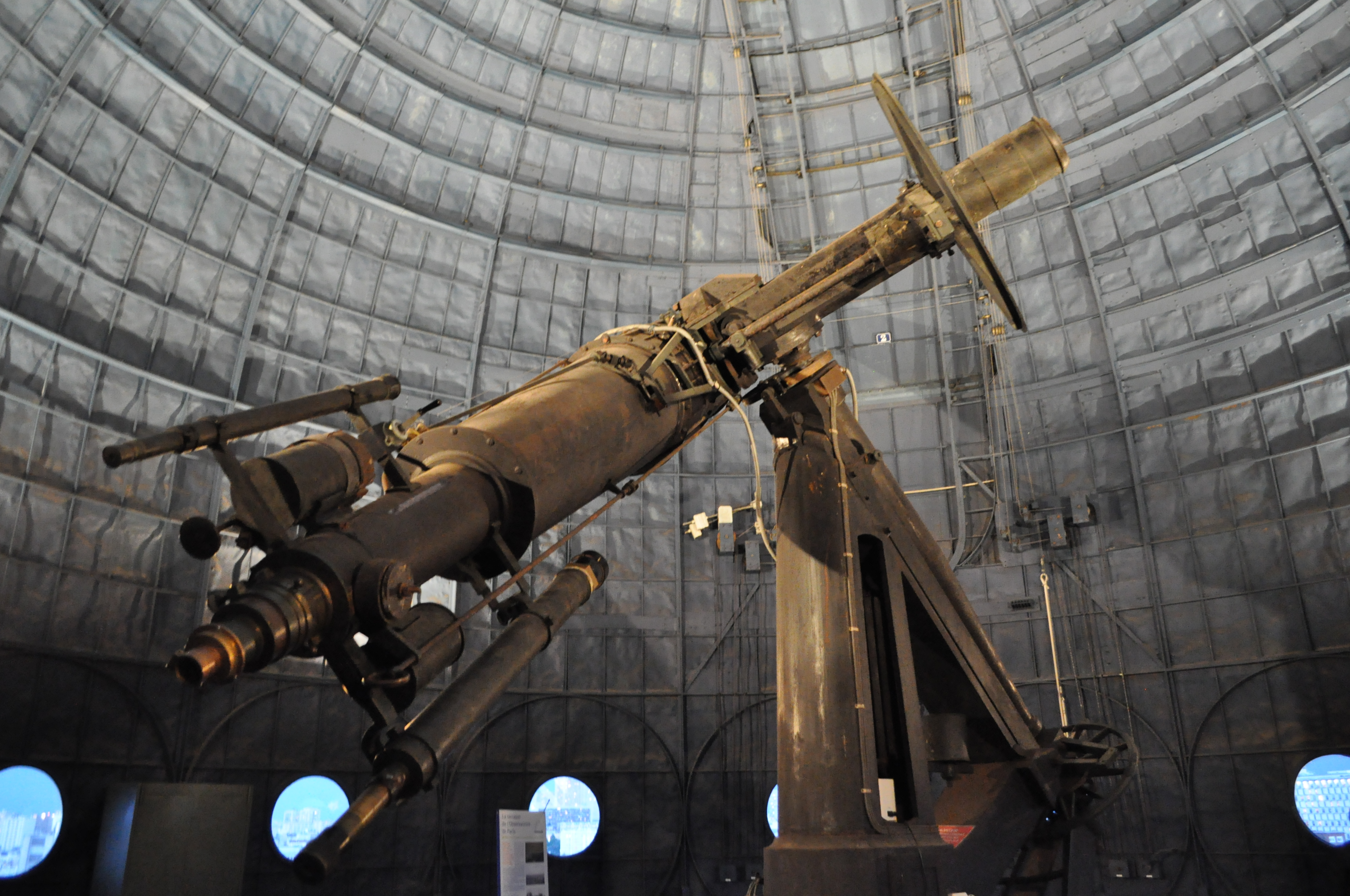 Observatoire de Paris.